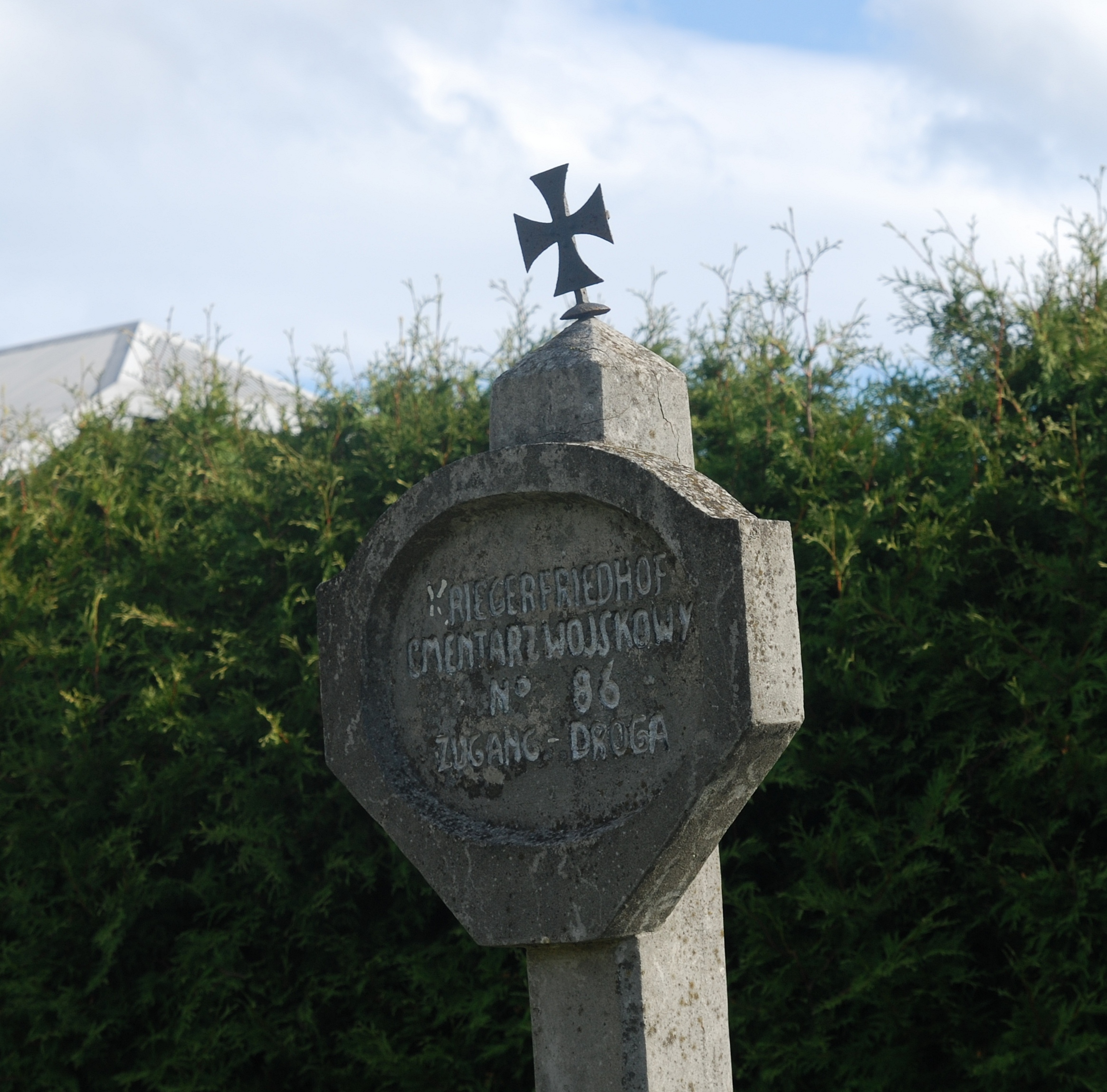 wieś Ropica Polska